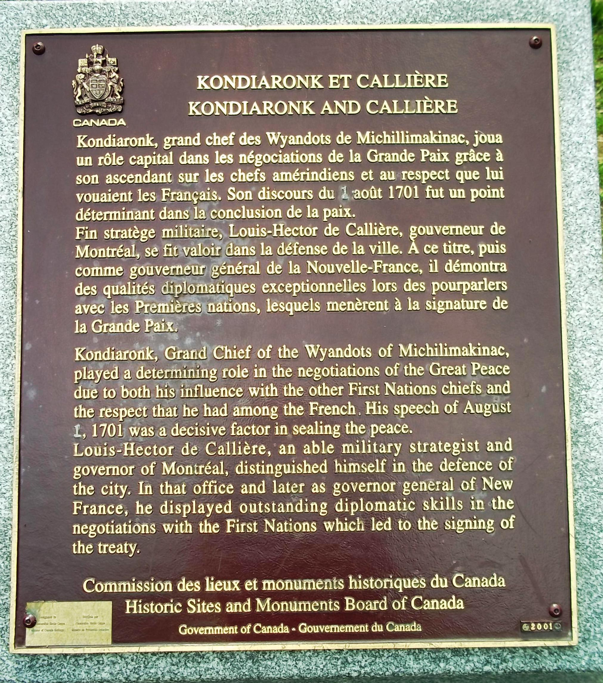 Plaque Kondiaronk et callière, Place de la Grande-Paix-de-Montréal. On peut y lire : « Kondiaronk, grand chef des Wyandots de Michillimakinac, joua un rôle capital dans les négociations de la Grande Paix de Montréal grâce à son ascendant sur les chefs amérindiens et au respect que lui vouaient les Français. Son discours du 1 août 1701 fut un point déterminant dans la conclusion de la paix. Fin stratège militaire, Louis-Hector de Callière, gouverneur de Montréal, se fit valoir dans la défense de la ville. À ce titre, puis comme gouverneur général de la Nouvelle-France, il démontra des qualités diplomatiques exceptionnelles lors des pourparlers avec les Premières nations, lesquels menèrent à la signature de la Grande Paix. »